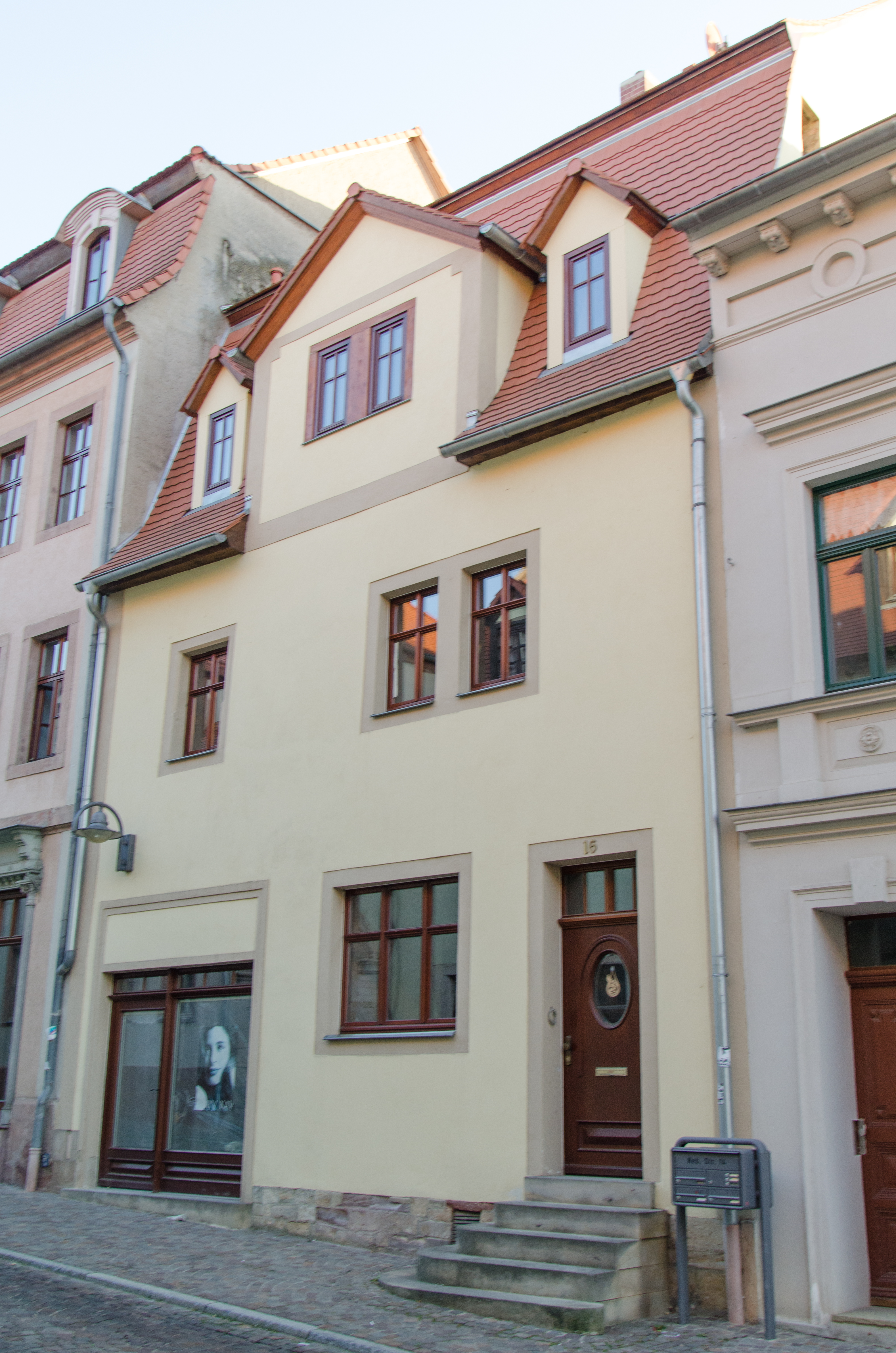 Querfurt, Nebraer Straße 16